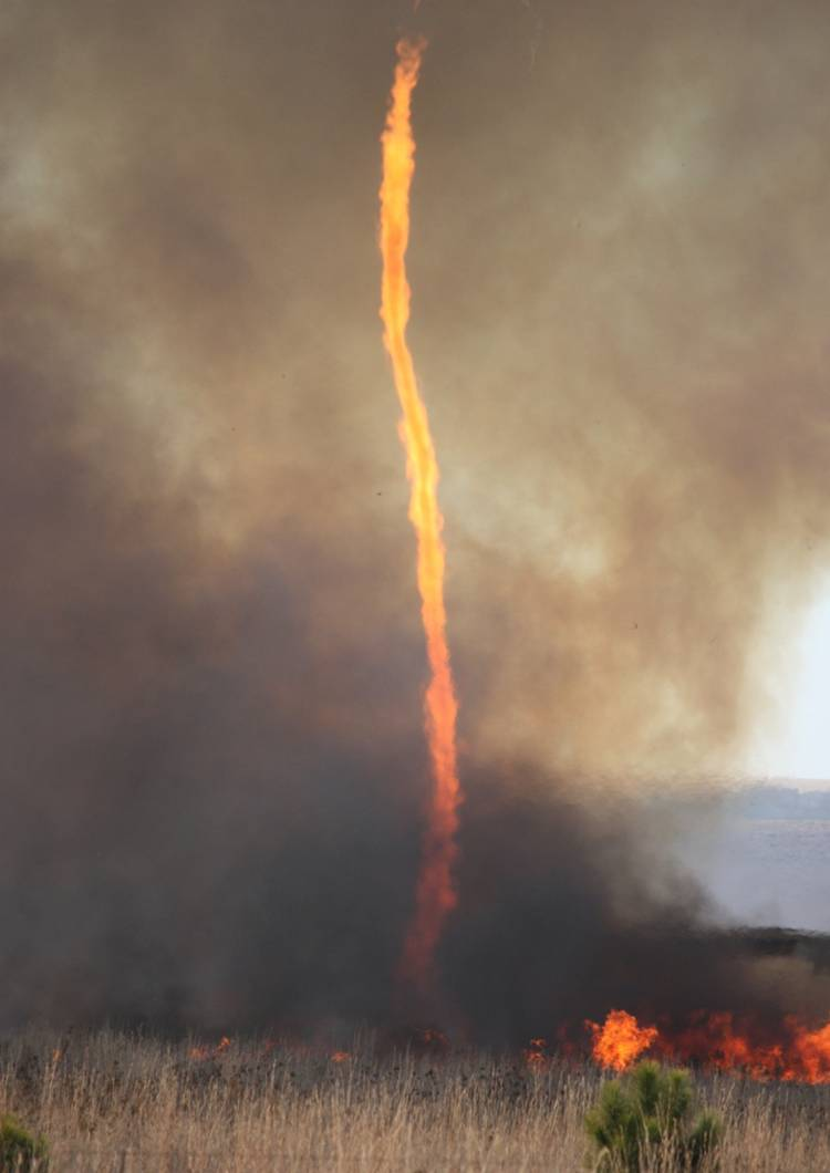 Ugnies sūkurys